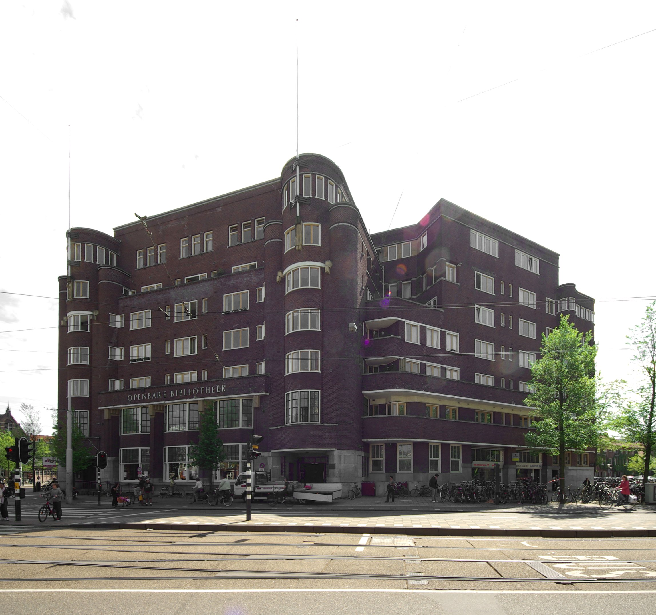 Het Nieuwe Huis in Amsterdam